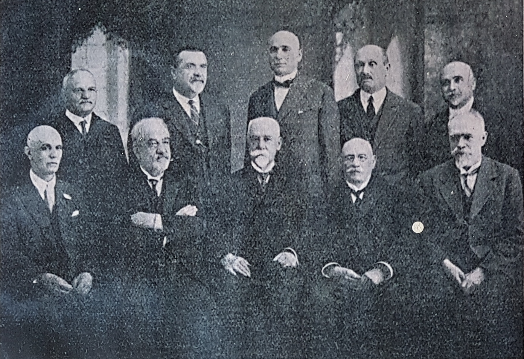 Изложбено табло за Първия научен комитет на „Ловеч и Ловчанско“ (1924 – 1934) във фонд Краезнание при Регионална библиотека „Проф. Беню Цонев“ – Ловеч. Седнали: инж. Трифон Трифонов, ген. о.з. Никифор П. Никифоров, проф. д-р Стефан Ватев, Иван К. Урумов, проф. Анастас Иширков. Правостоящи: Дочо Банков, проф. д-р Парашкев Стоянов, проф. д-р Михаил Ц. Минев, проф. д-р Тошко Петров, Лукан М. Луканов.